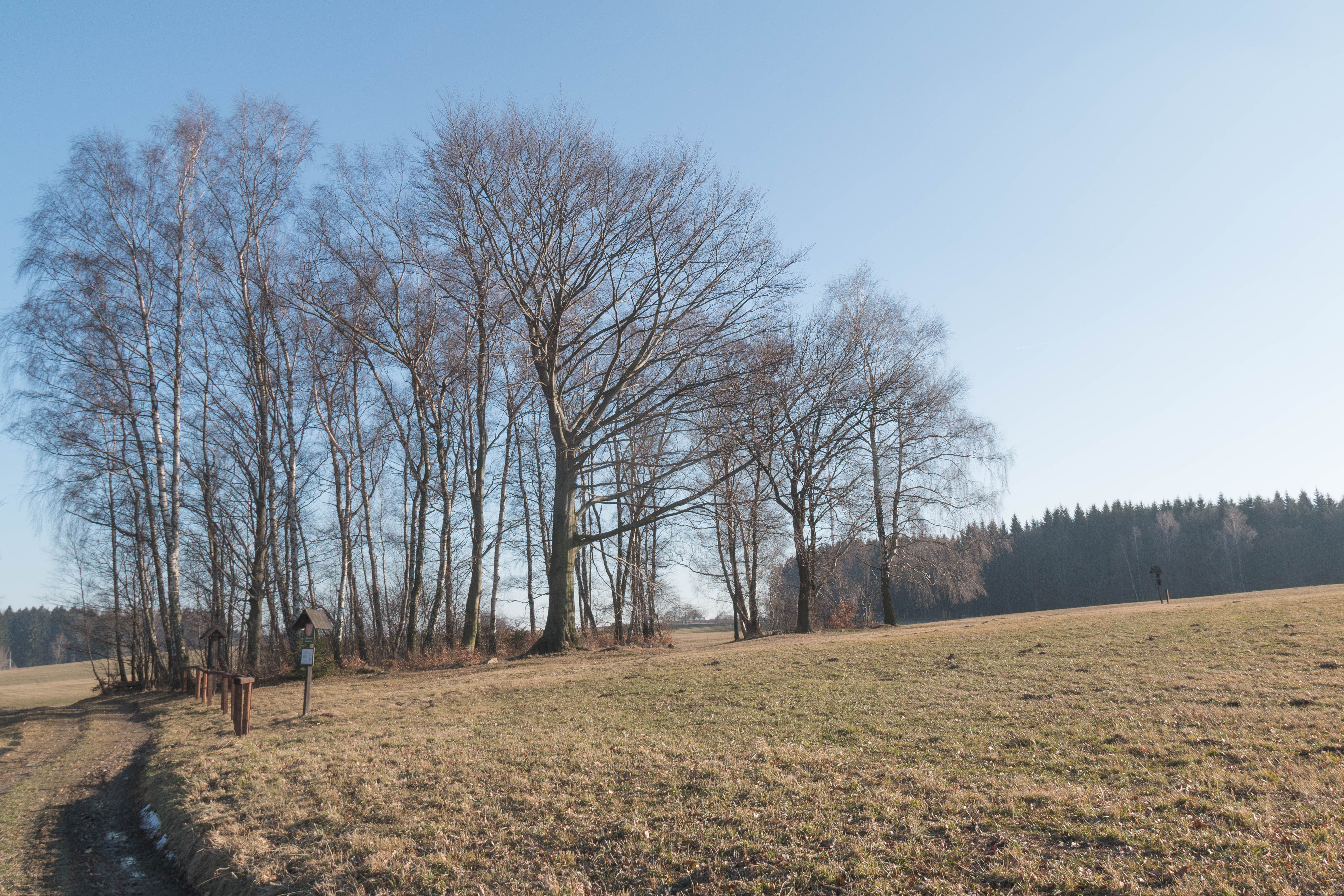 Přírodní památka Polánka Project: Chráněná území.